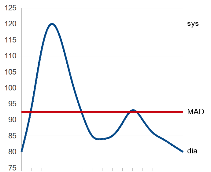 Darstellung des mittleren arteriellen Drucks in einer typischen Blutdruckkurve peripherer Gefäße. Y-Achse: mmHg